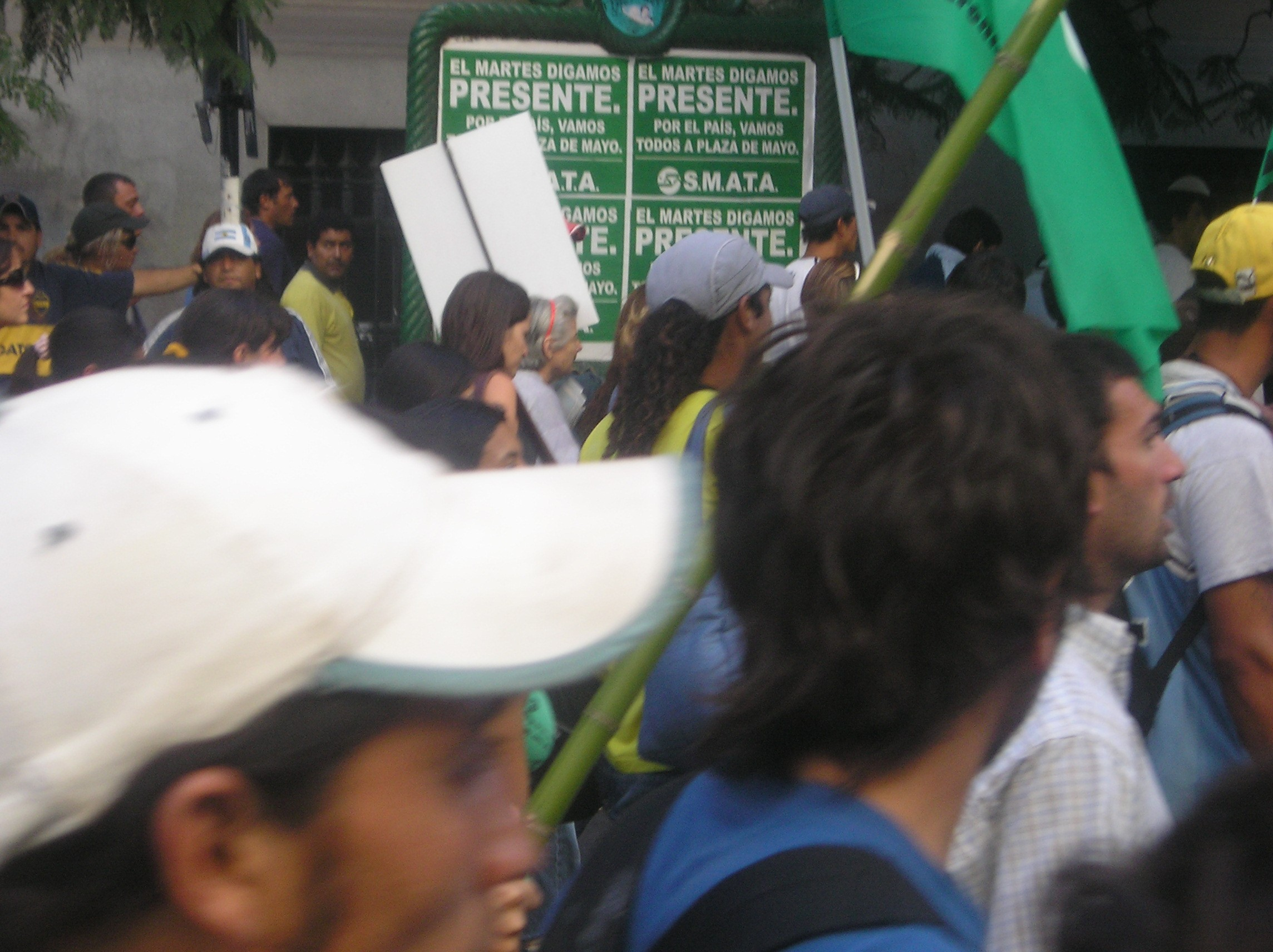 Marcha de apoyo a Cristina. Paro agropecuario. Plaza de Mayo. Buenos Aires